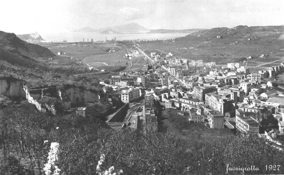 Napoli, quartiere di Fuorigrotta, veduta dalla collina di Posillipo (1927).